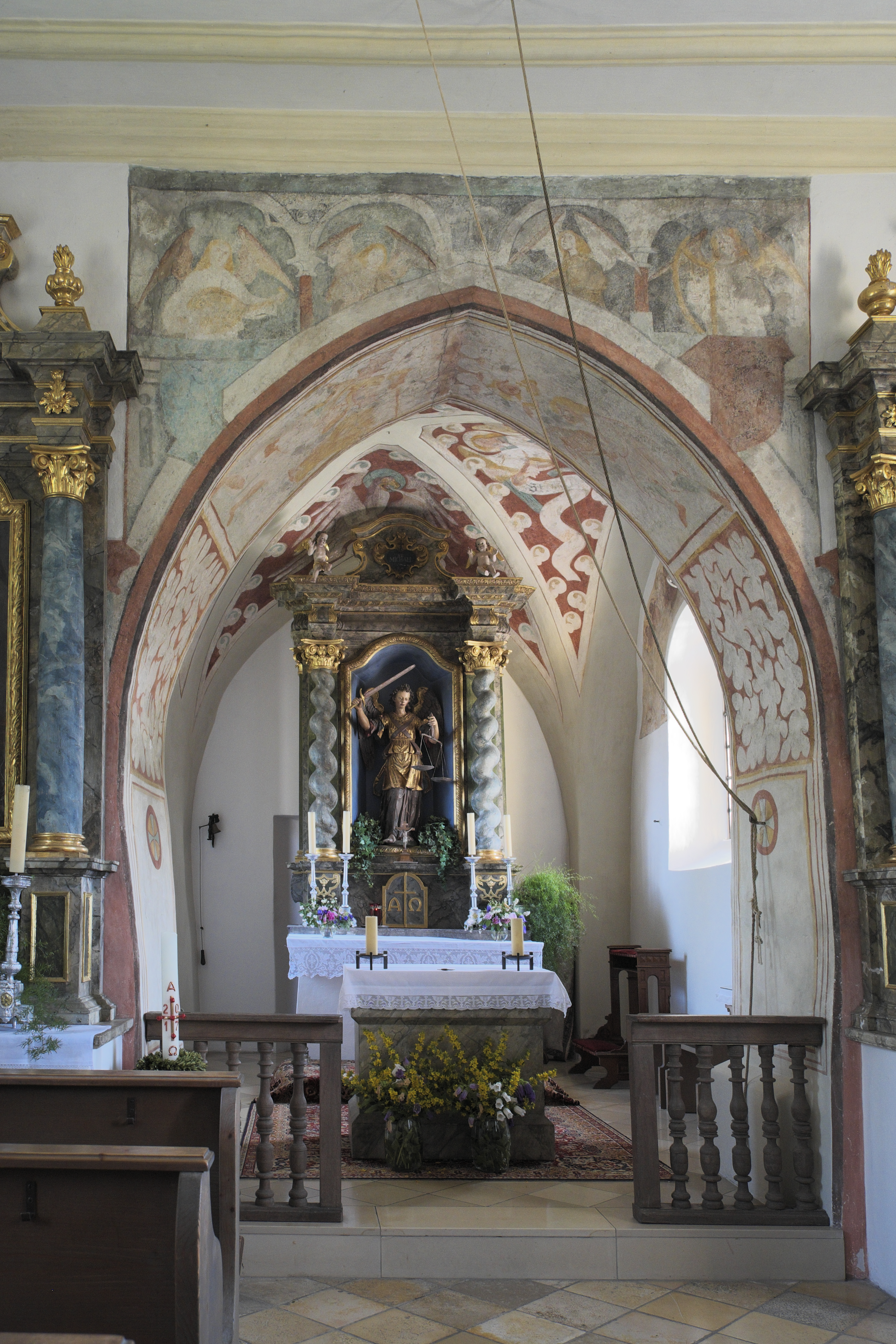 Katholische Filialkirche St. Michael in Zell (Schäftlarn) im Landkreis München (Bayern, Deutschland), Innenraum, Blick zum Chor; Chorbogen mit Fresken aus dem 15. Jahrhundert; Darstellung: musizierende Engel